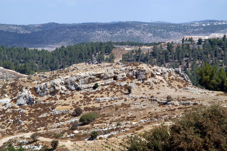 מבט על ח'ירבת ג'מג'ום, היושבת בראש המצוק